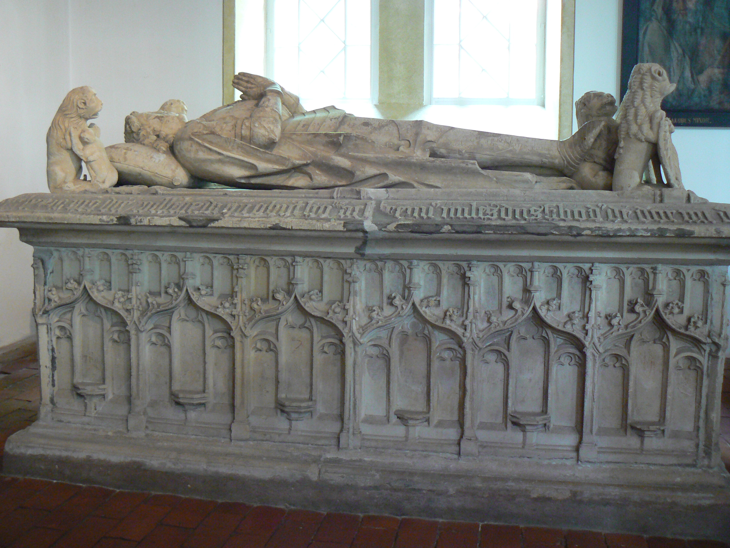 Sibet Attena Sarkophag St.-Magnus-Kirche in Esens/Germany (1473)